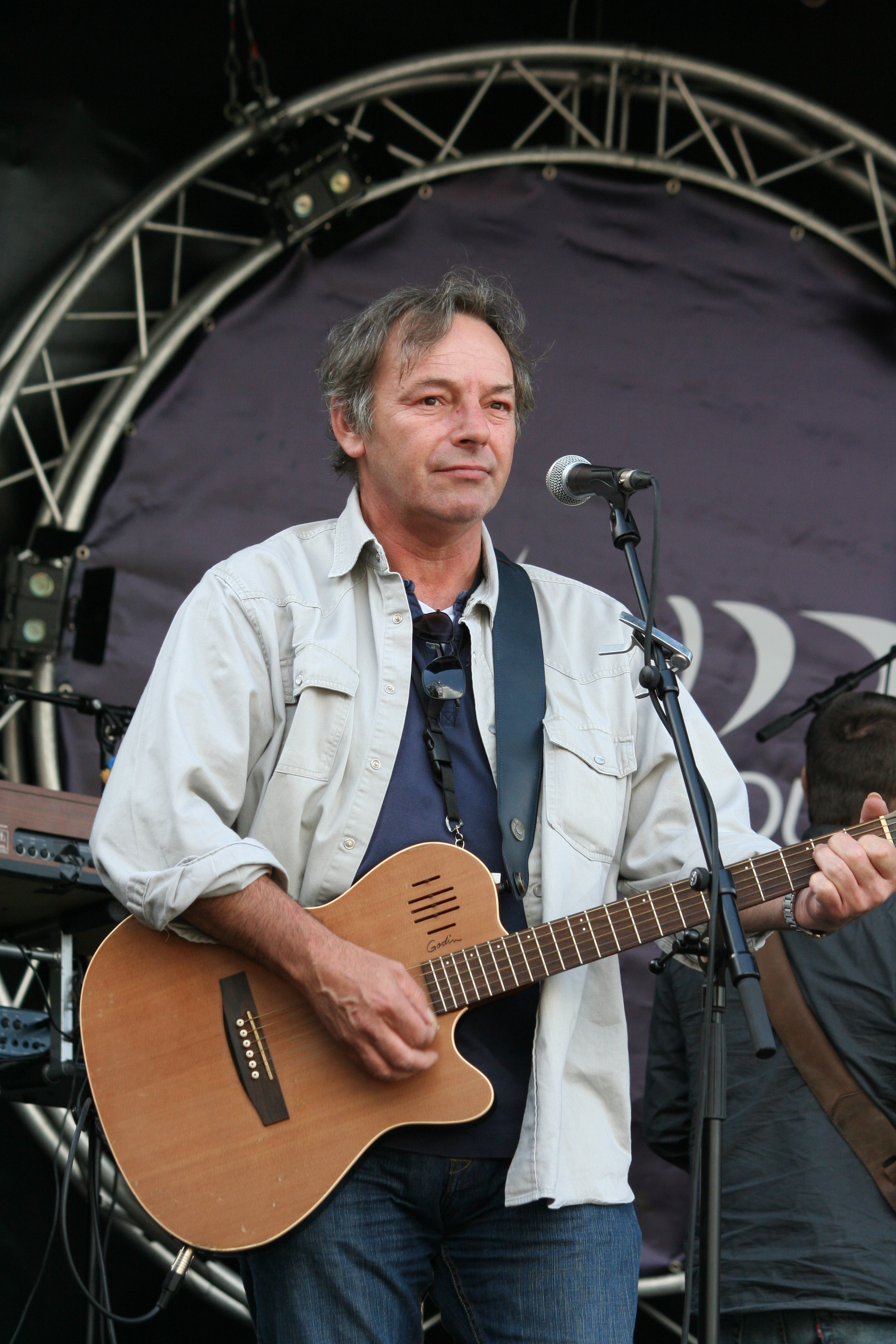 Fête de la Musique à Saint-Lô - France : Soldat Louis pendant les balances